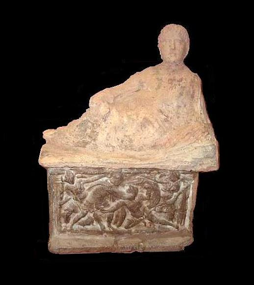 Tampa de urna funerária etrusca, com cenas de batalha e dama em banquete. Acervo do Museu de Arqueologia e Etnologia da Universidade de São Paulo. Fotografia de Eliel Bragatti e Renata Martins Rocha, postadas na galeria do LiGEA USP.